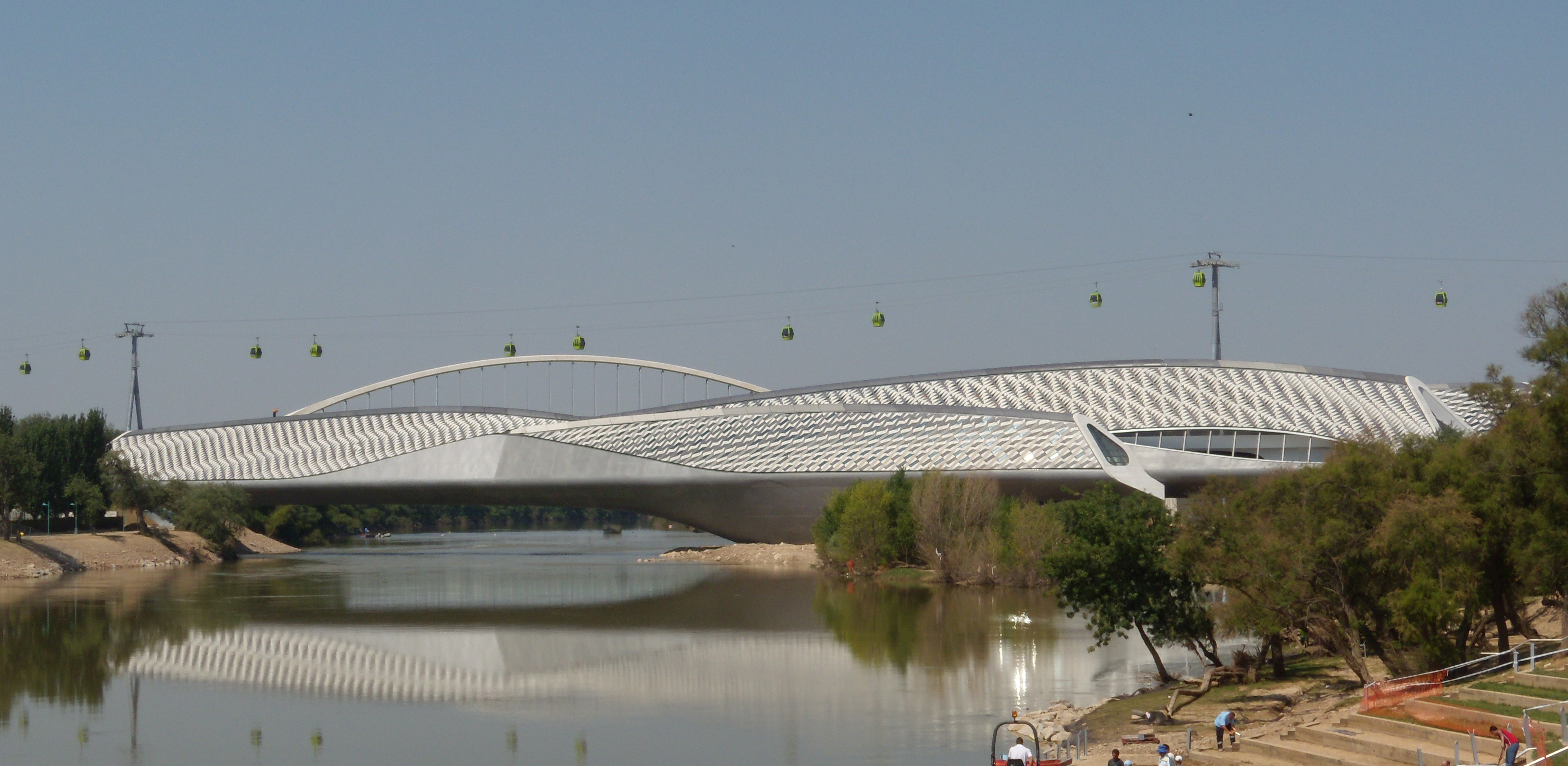 Pabellón-Puente Zaragoza